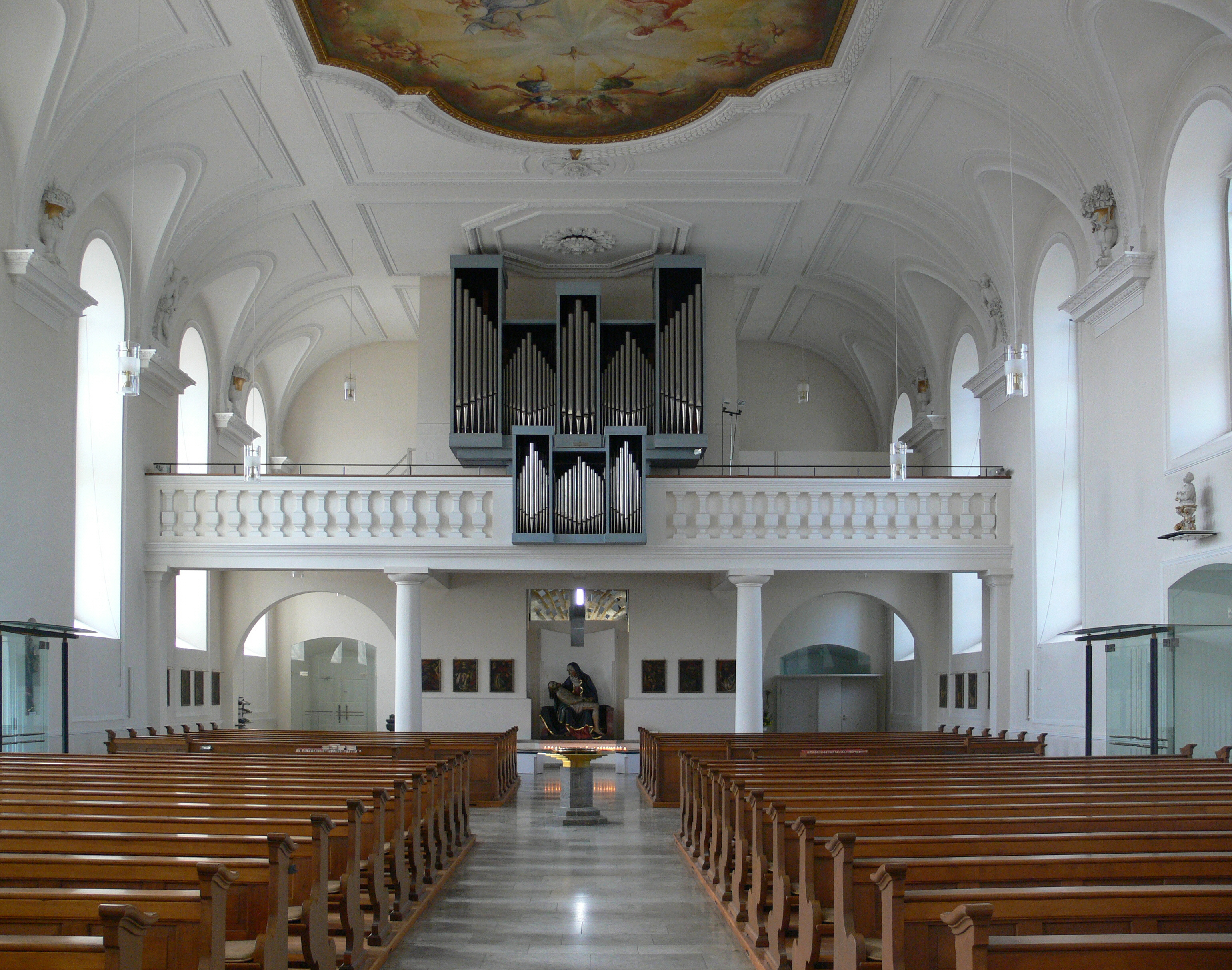 Kath. Pfarrkirche Mariä Heimsuchung, Meersburg (Bodenseekreis) Blick zur Orgel